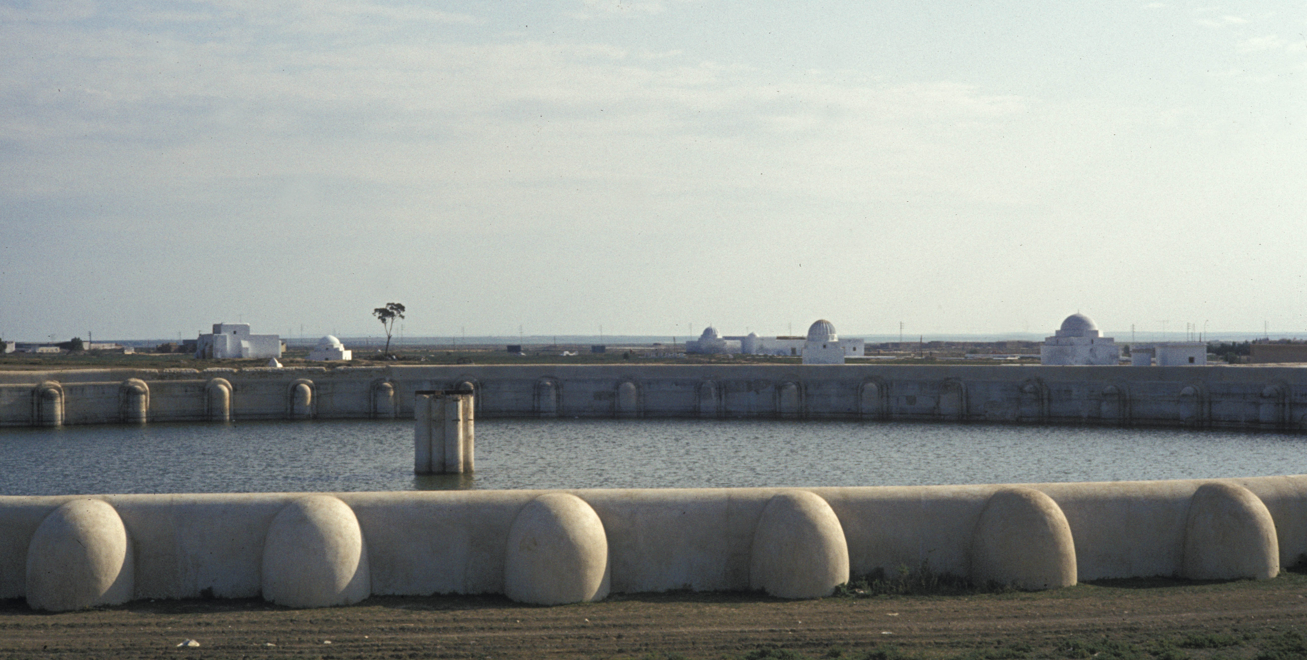 Tunisia